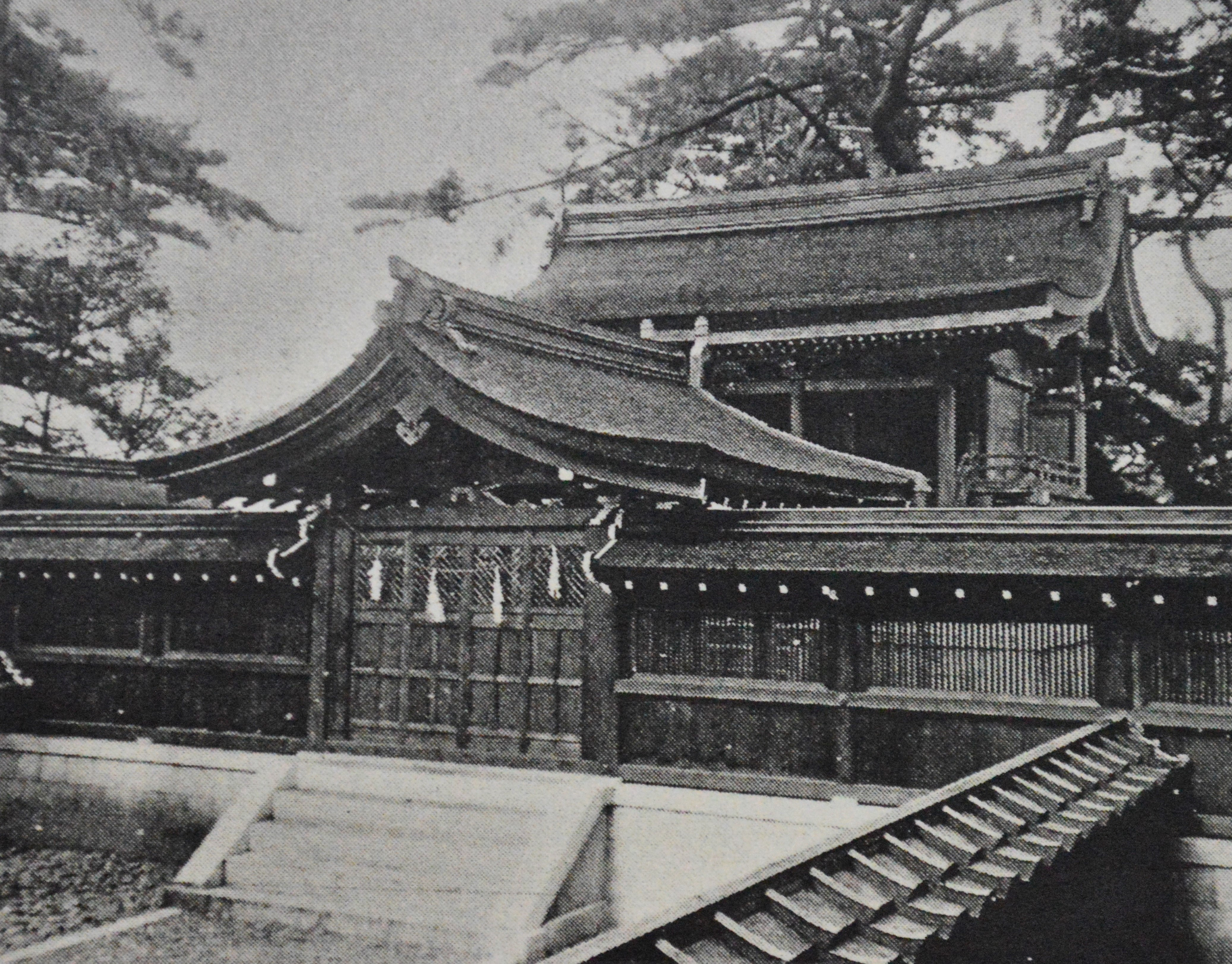 愛知県碧海郡桜井村（現・愛知県安城市）にある桜井神社。1930年頃。